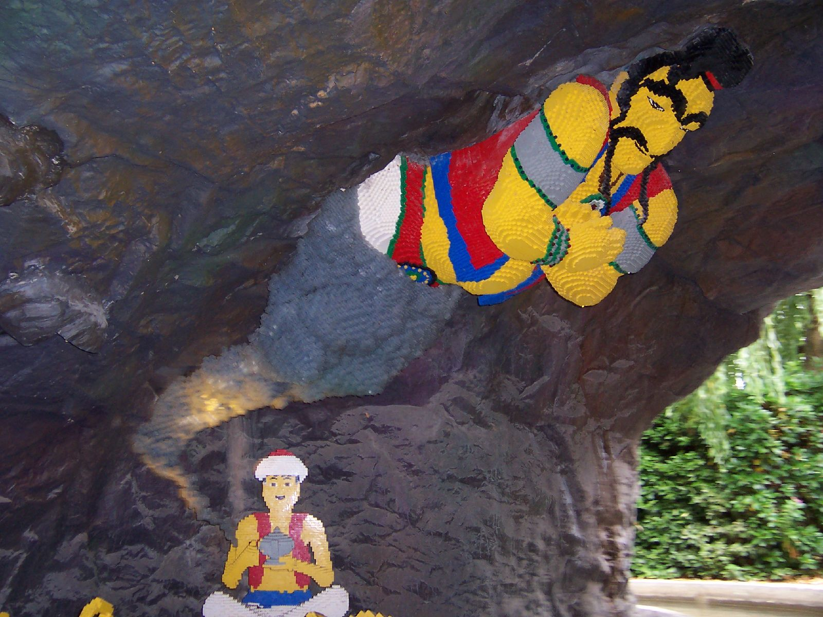 Legoland Windsor: Aladdin and genie.